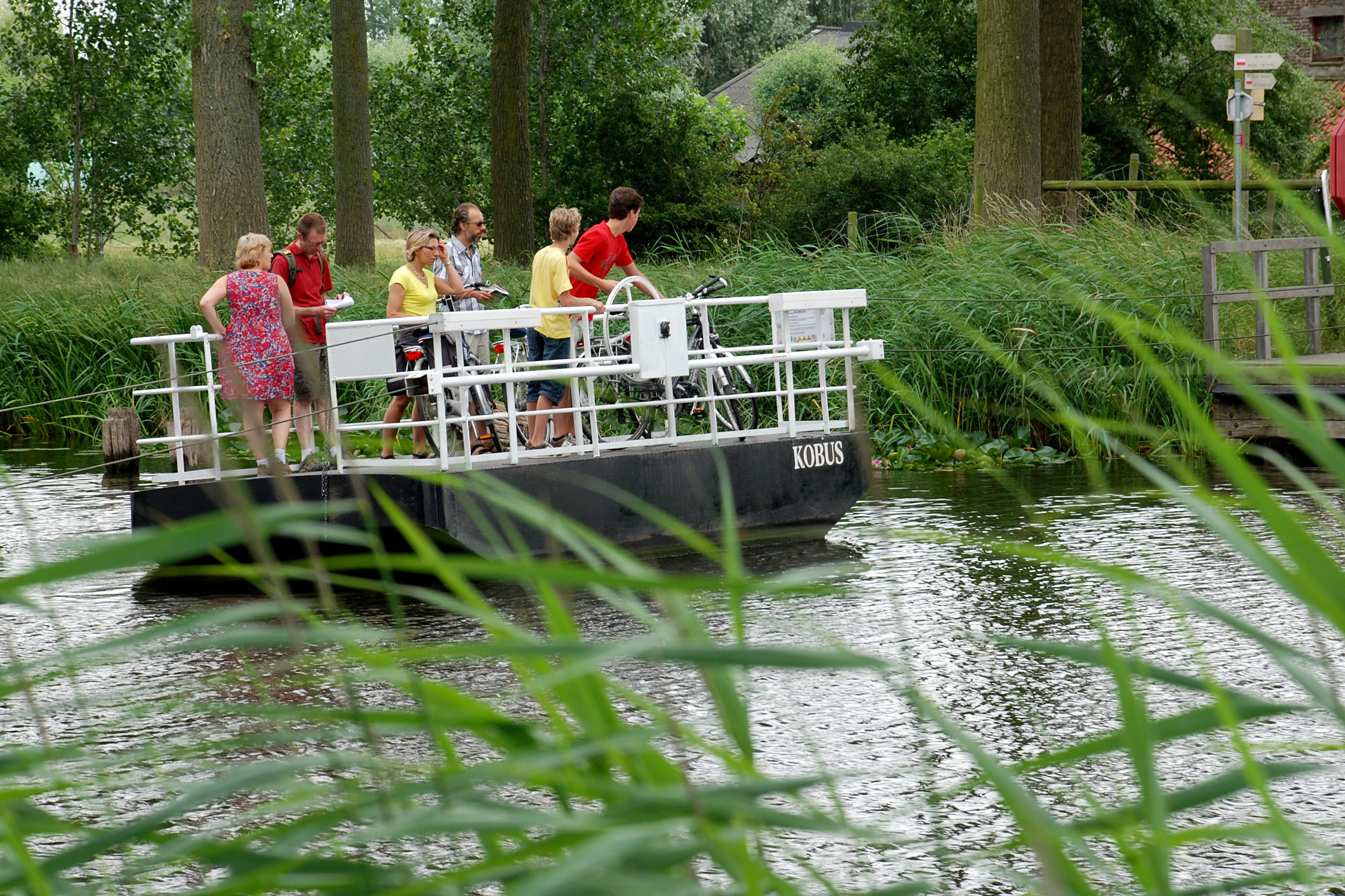 Pont over de Damse Vaart te Lapscheure